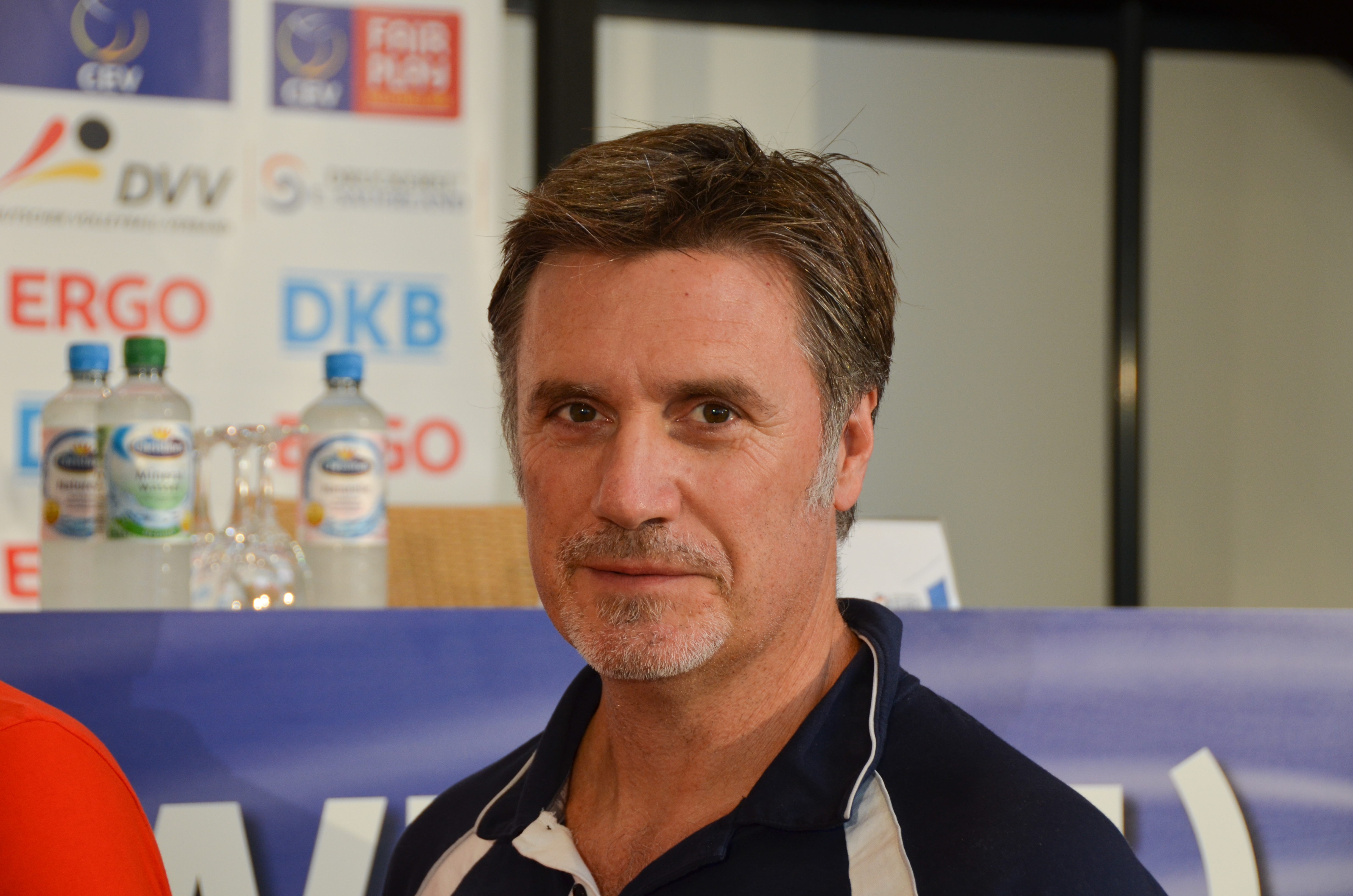 Volleyball-Europameisterschaft der Frauen 2013-Spielort Halle (Westf) Gerry-Weber-Stadion